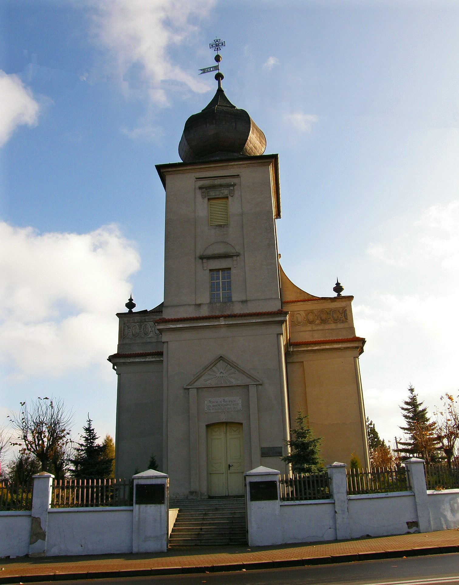 Kościół-ewangielicko-reformowany z 1803 w Zelowie